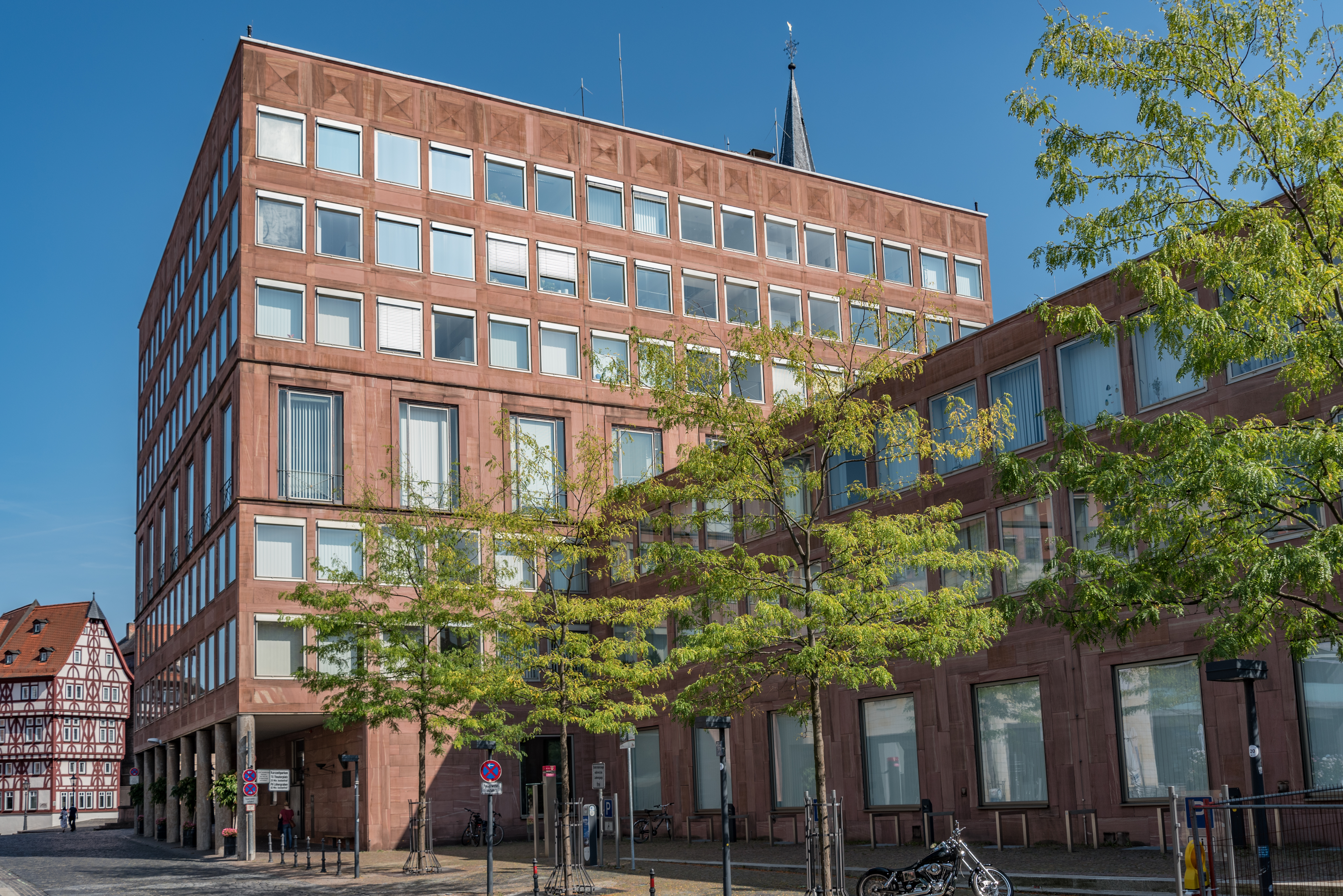 Aschaffenburg, Dalbergstraße 16